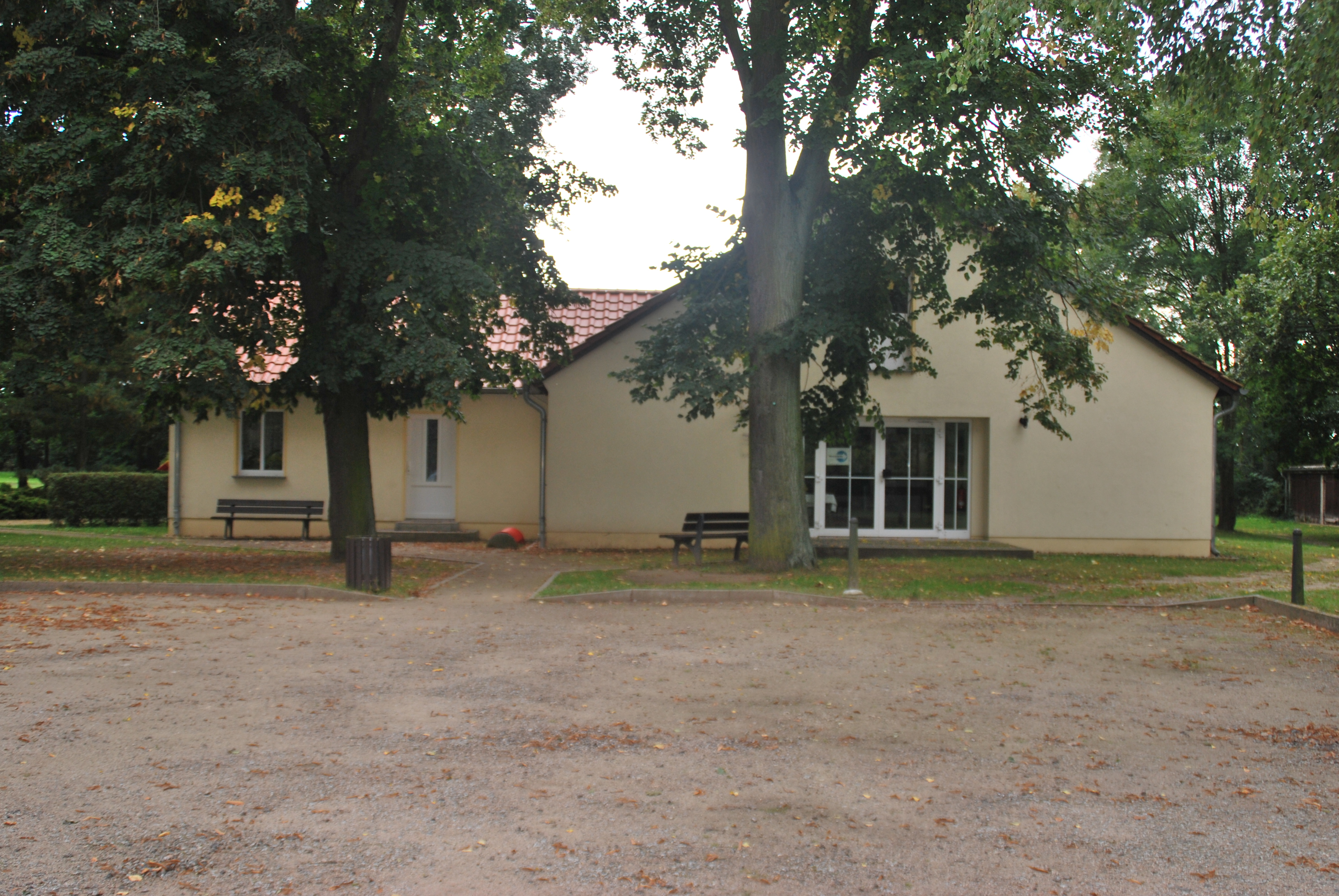 Ehemalige Schule Rathstock; heute Gemeindezentrum und Heimatstube mit Museum zur Geschichte der Region